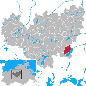 Schorssow in Mecklenburg-Vorpommern - District Güstrow